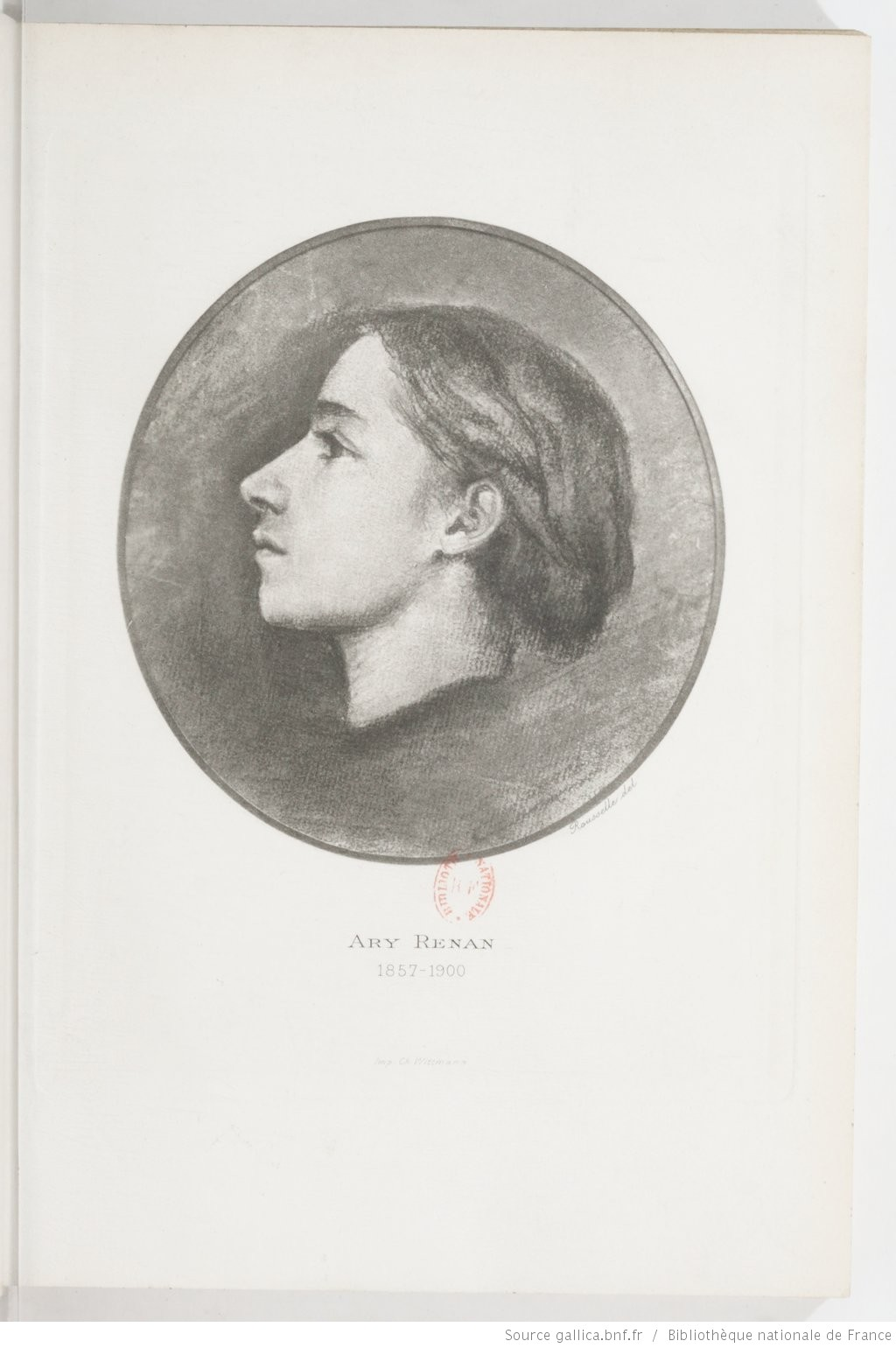 Retrato de Ary Renan que aparece en su obra Rêves d'Artiste (Paris: Calmann-Lévy, Éditeurs; 1901).